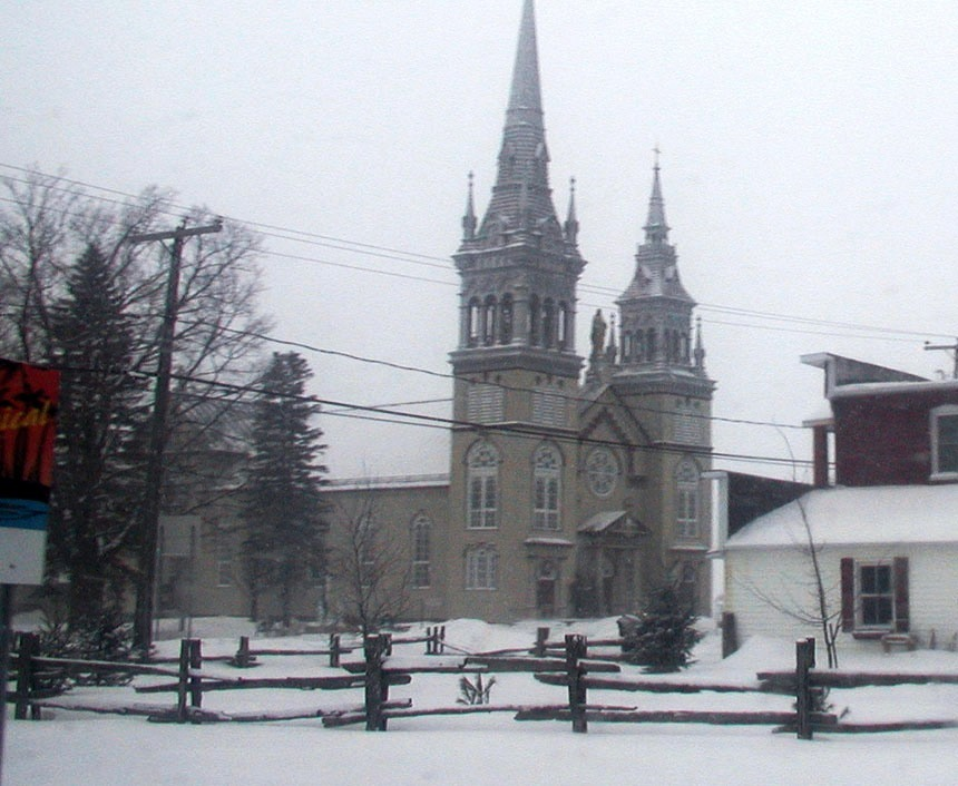 Village de Lyster, au Québec.